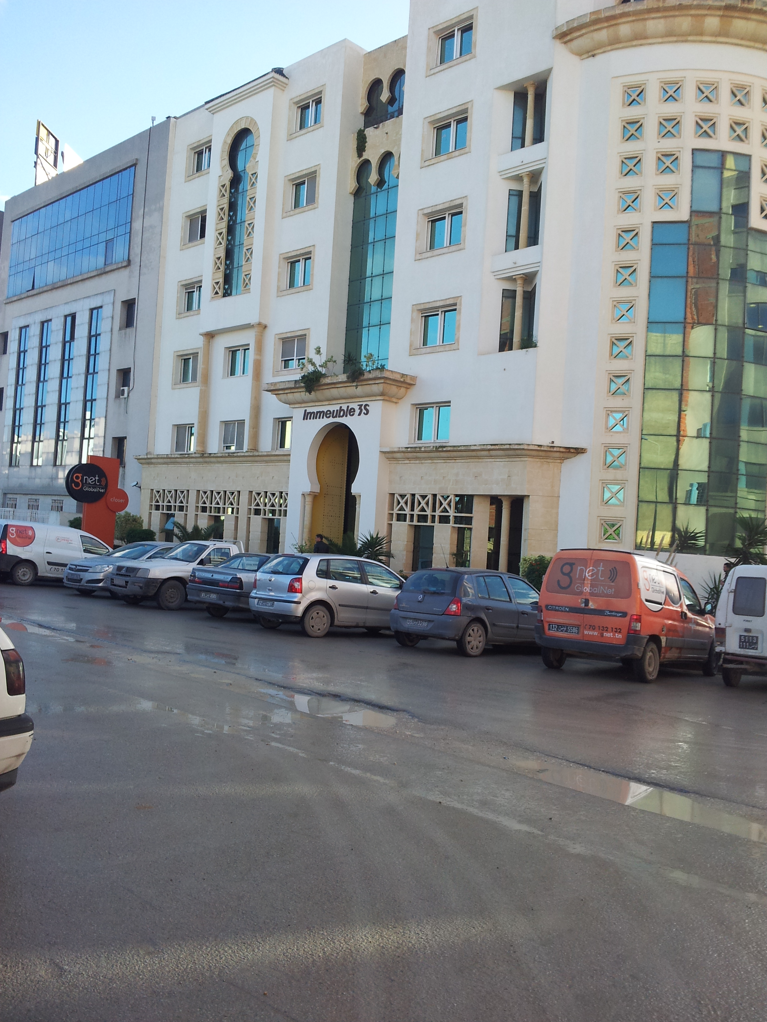 Local de 3S à Montplaisir, Tunis.